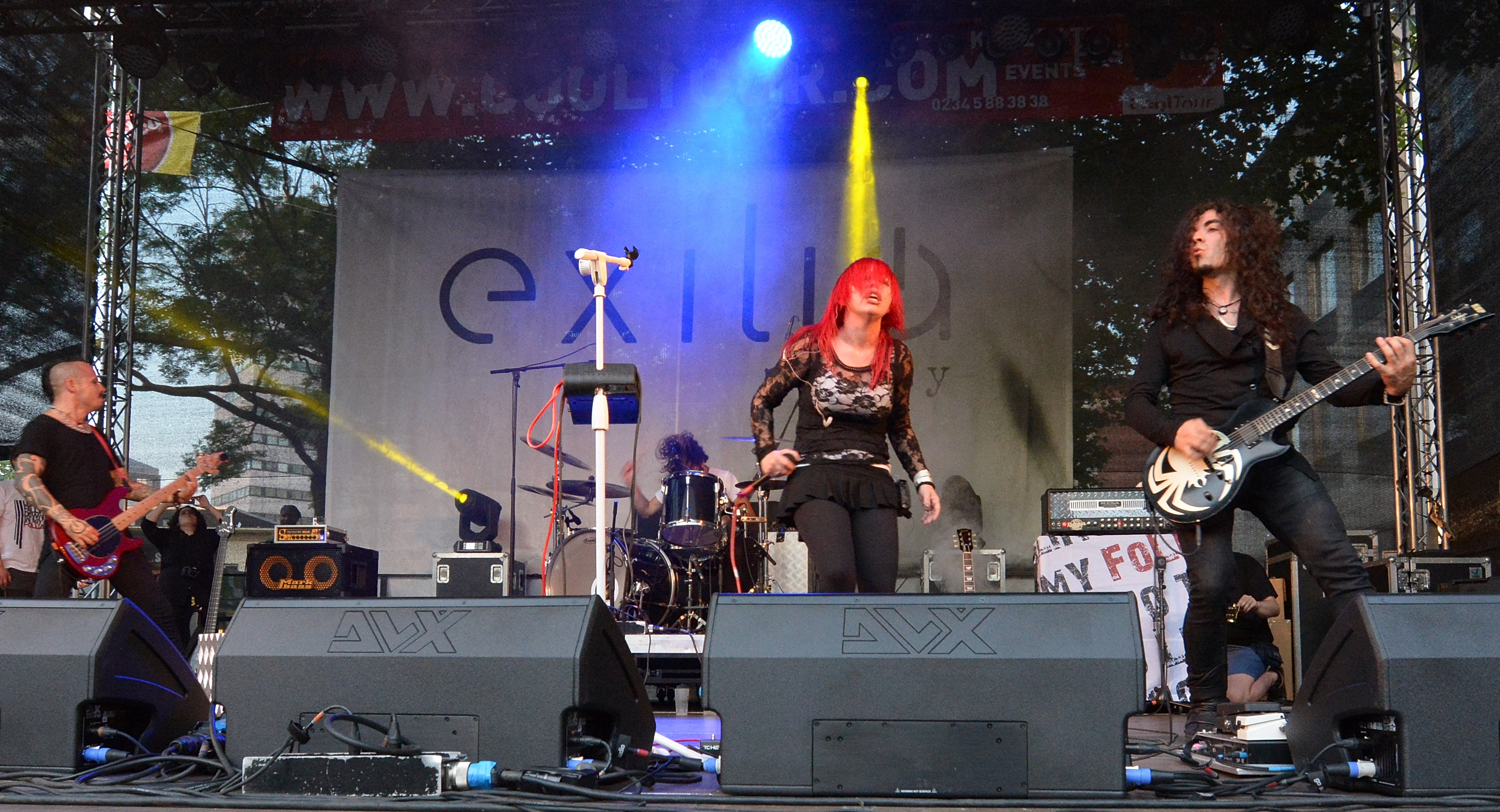 Exilia bei Bochum Total 2015